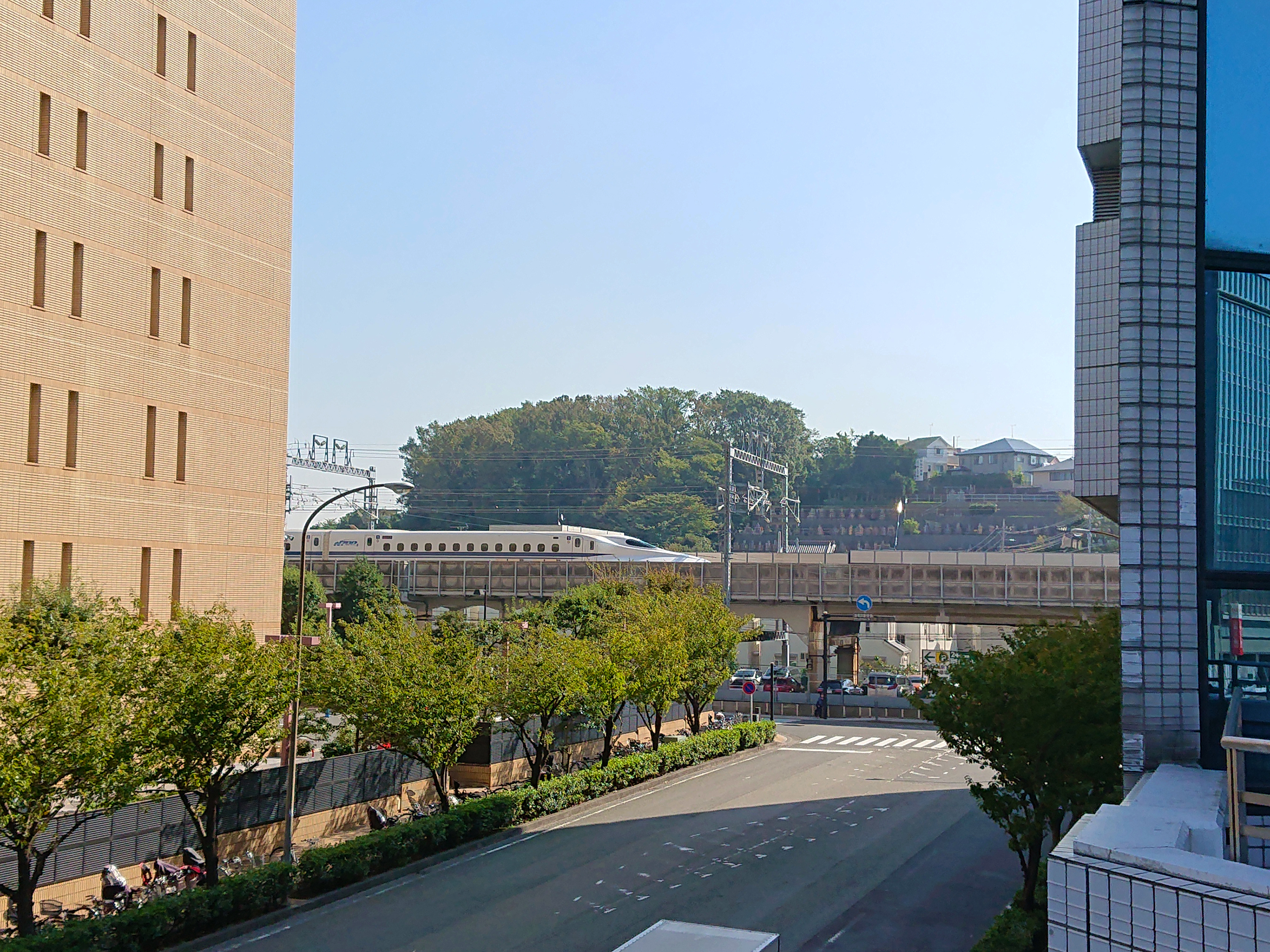 ビル群の合間にみる篠原城と新幹線